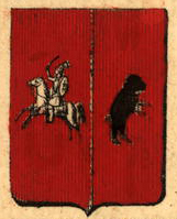 Беларуская (тарашкевіца): Герб Аўгустоўскай губэрні (Aŭgustoŭ) з Пагоняй (Pahonia)